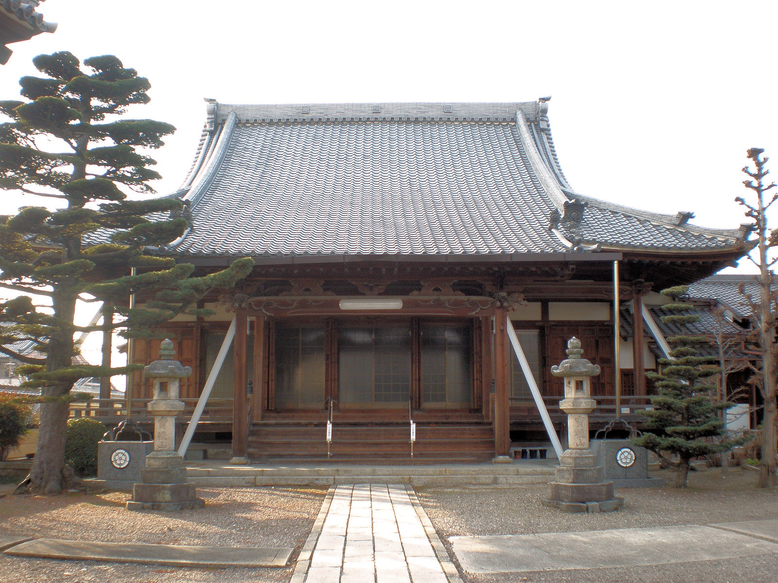 愛知県小牧市にある西源寺の本堂